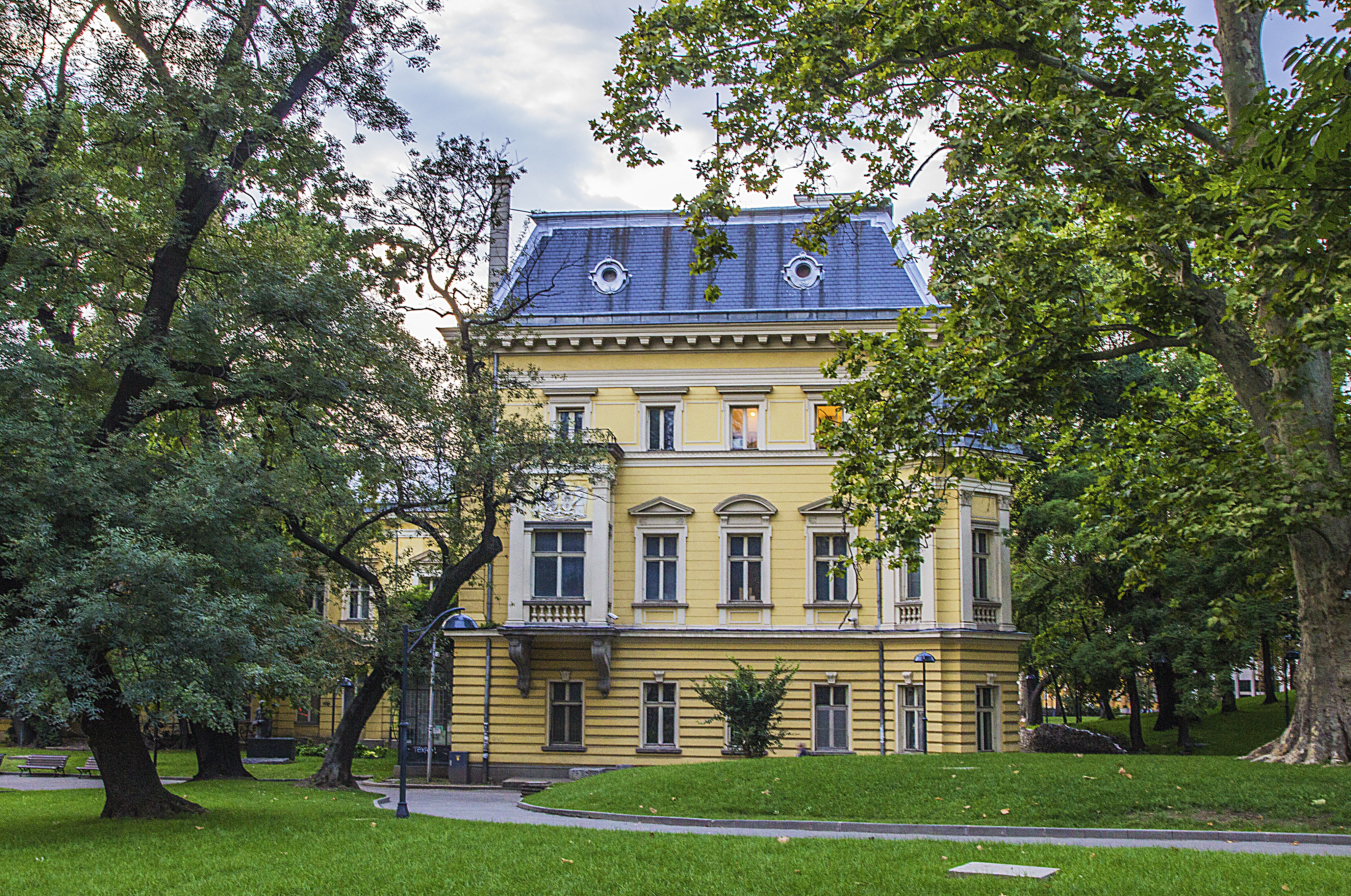 Националната художествена галерия - Централното историческо ядро на София